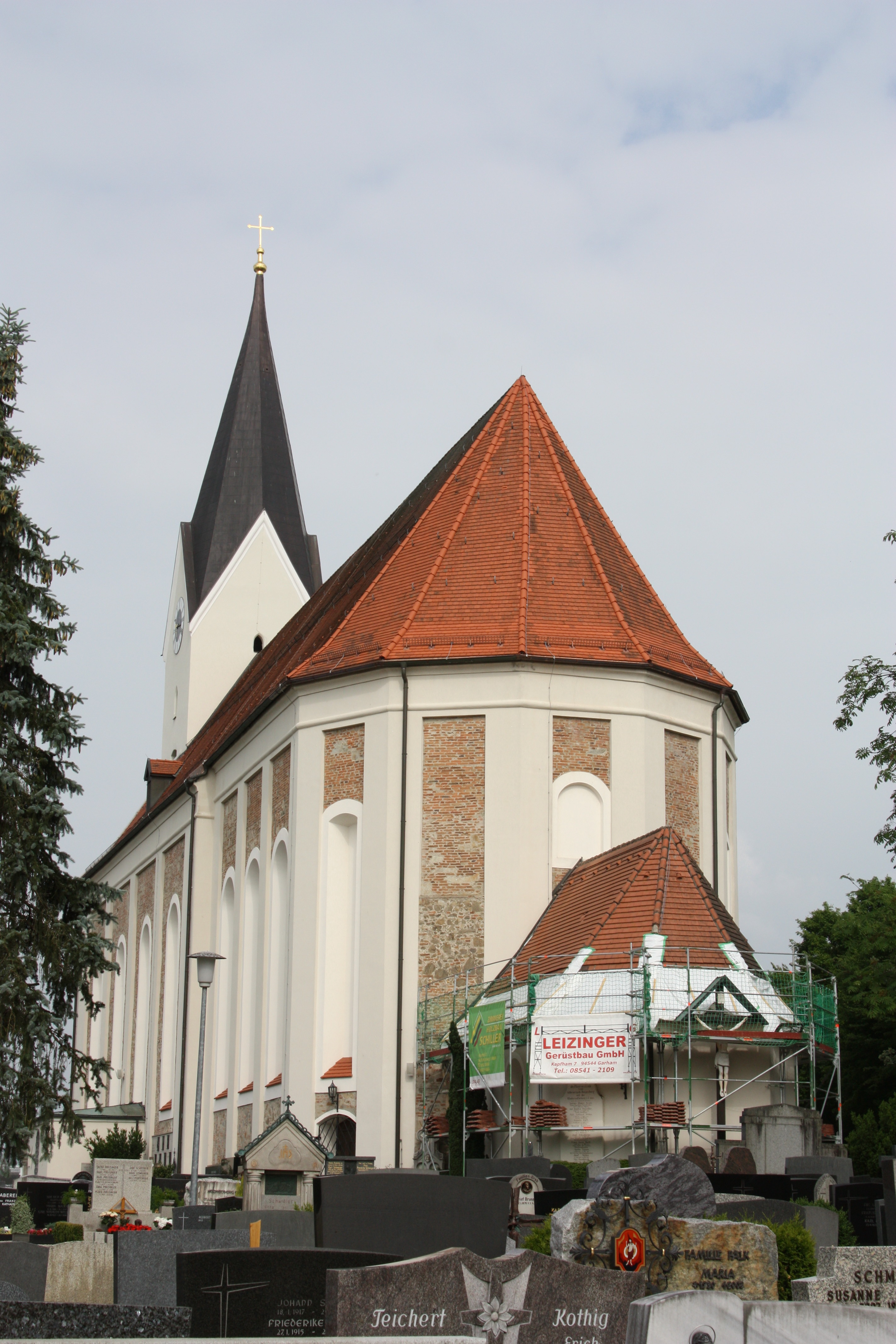 Kath. Pfarrkirche St. Michael, spätgotischer Saalbau um 1290, neubarocke Umgestaltung 1908